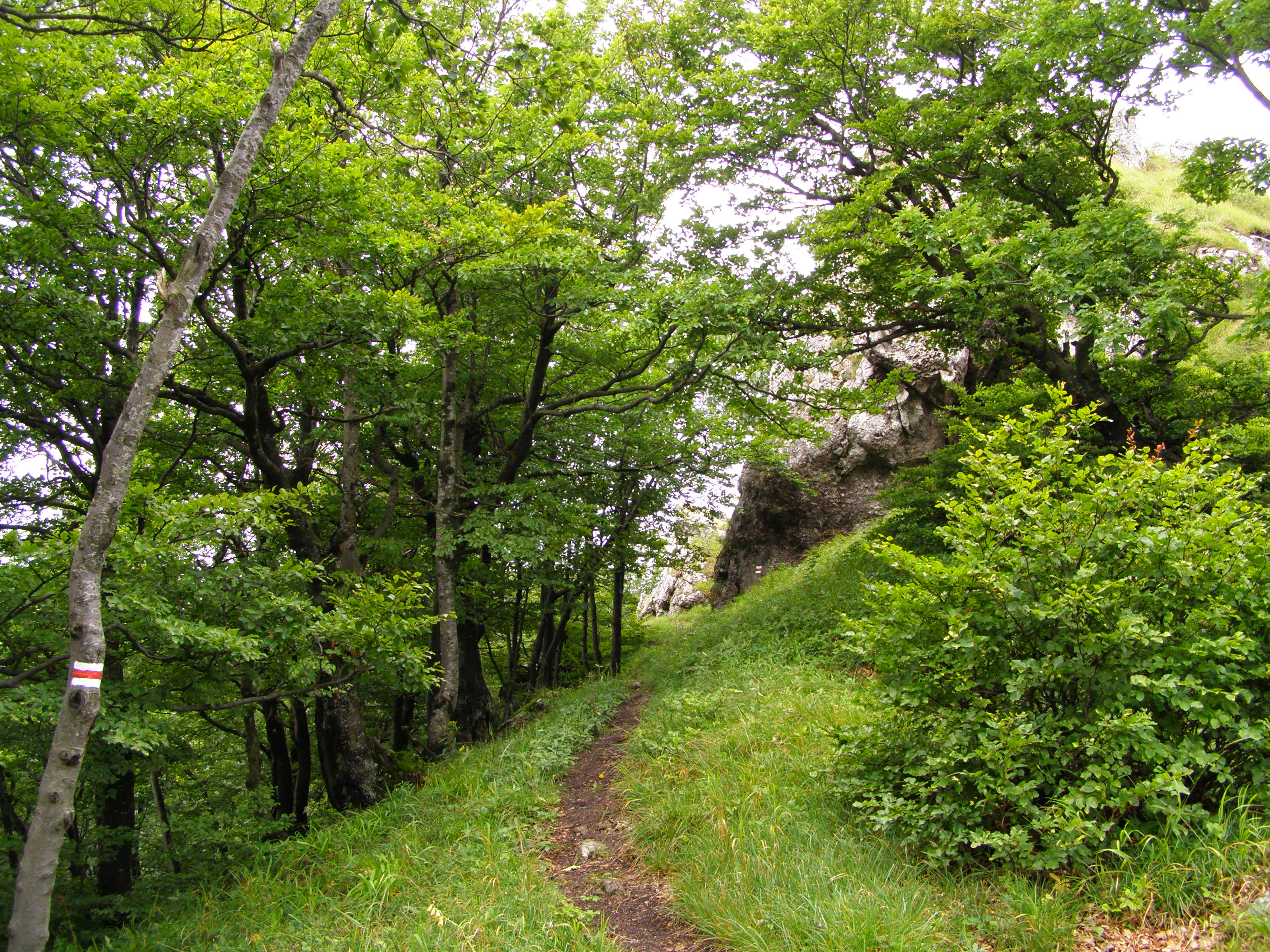 Lúčanská Fatra, vrchol Ostrá skala (1220 m)